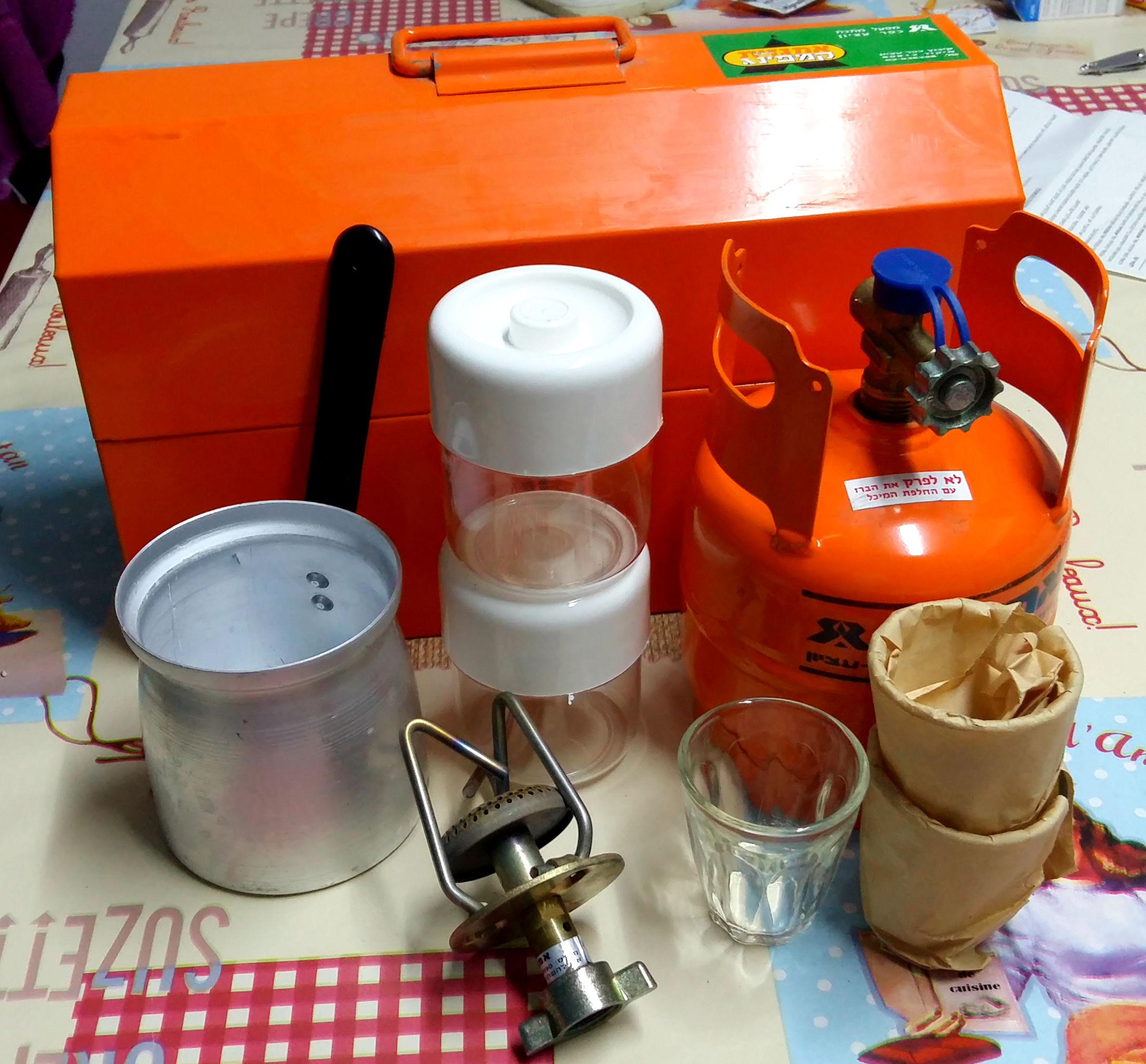 פק"ל קפה "אמגזית קמפינג"